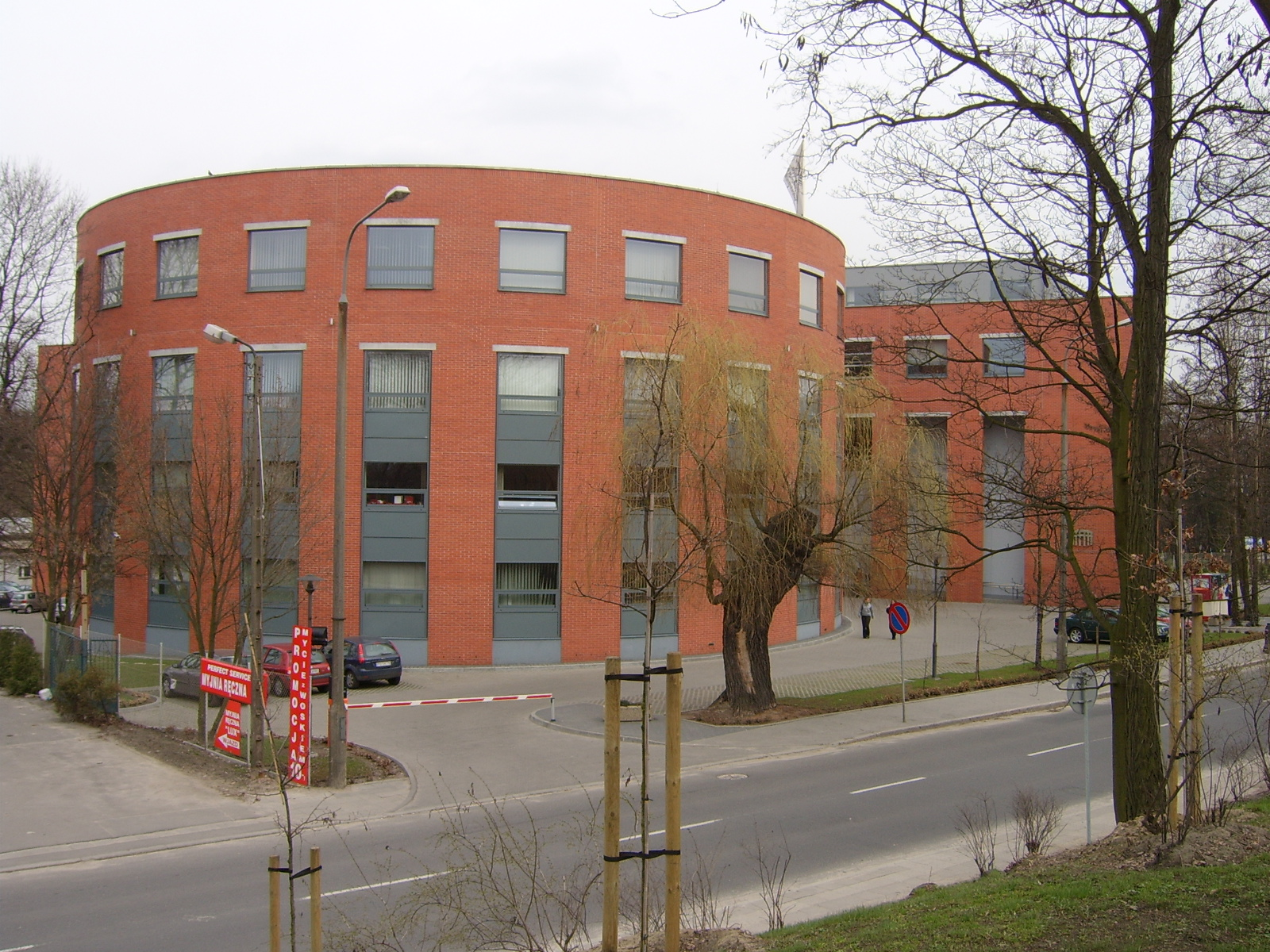 Wyższa Szkoła Nauk Humanistycznych i Dziennikarstwa w Poznaniu. Autor zdjęcia: Cruizer